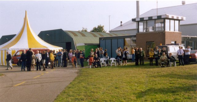 EAC-m Torentje